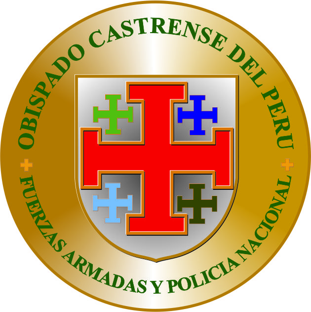 Logotipo del Obispado Castrense